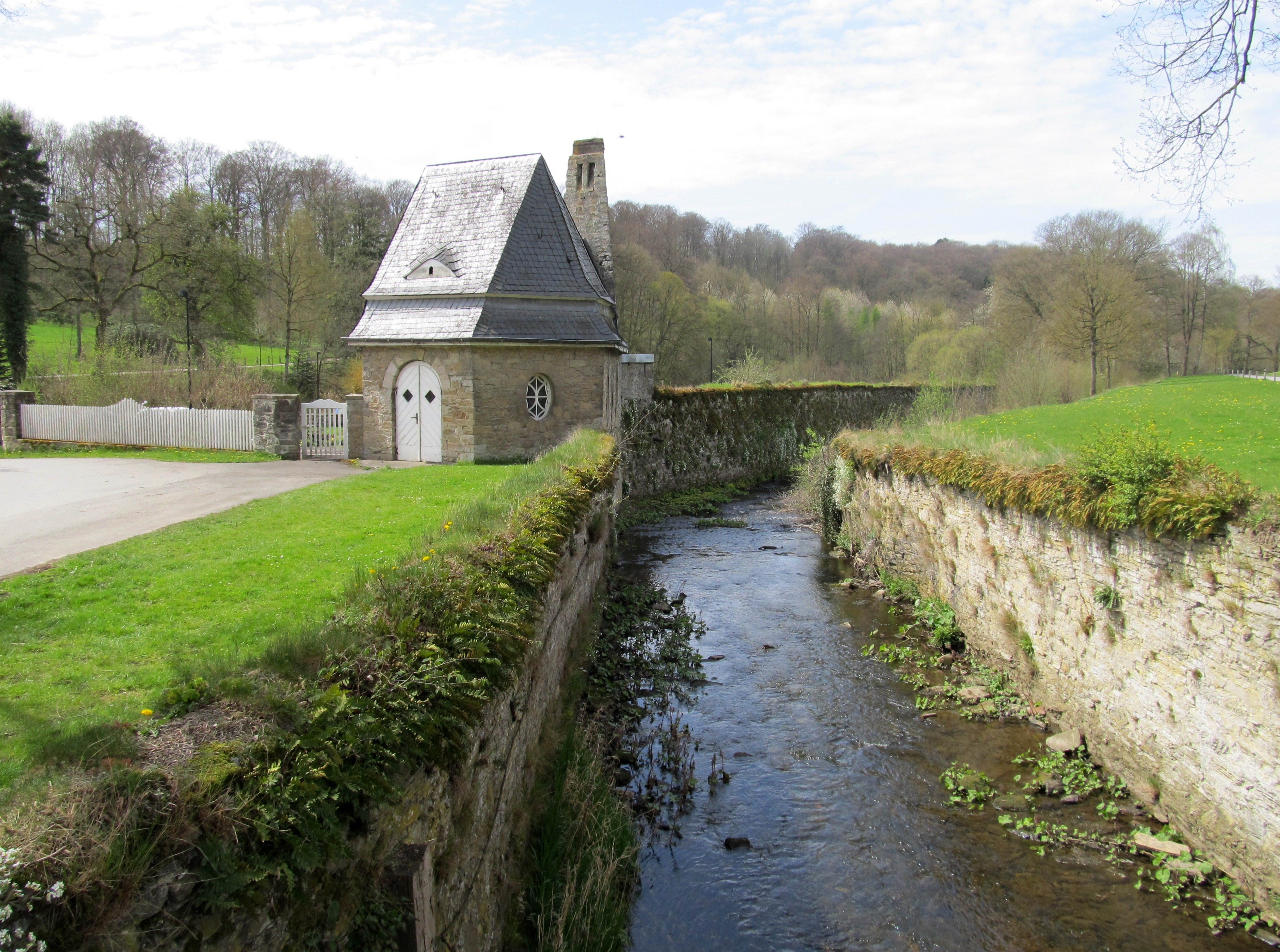 Glenne bei Schloss Körtlinghausen, Rüthen (Germany)